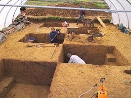 Ausgrabung Usingen E. Laufer